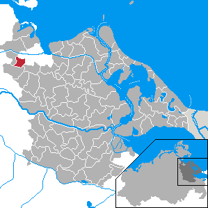 Hinrichshagen, Landkreis Ostvorpommern, Mecklenburg-Vorpommern